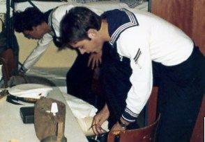 Marinemütze1